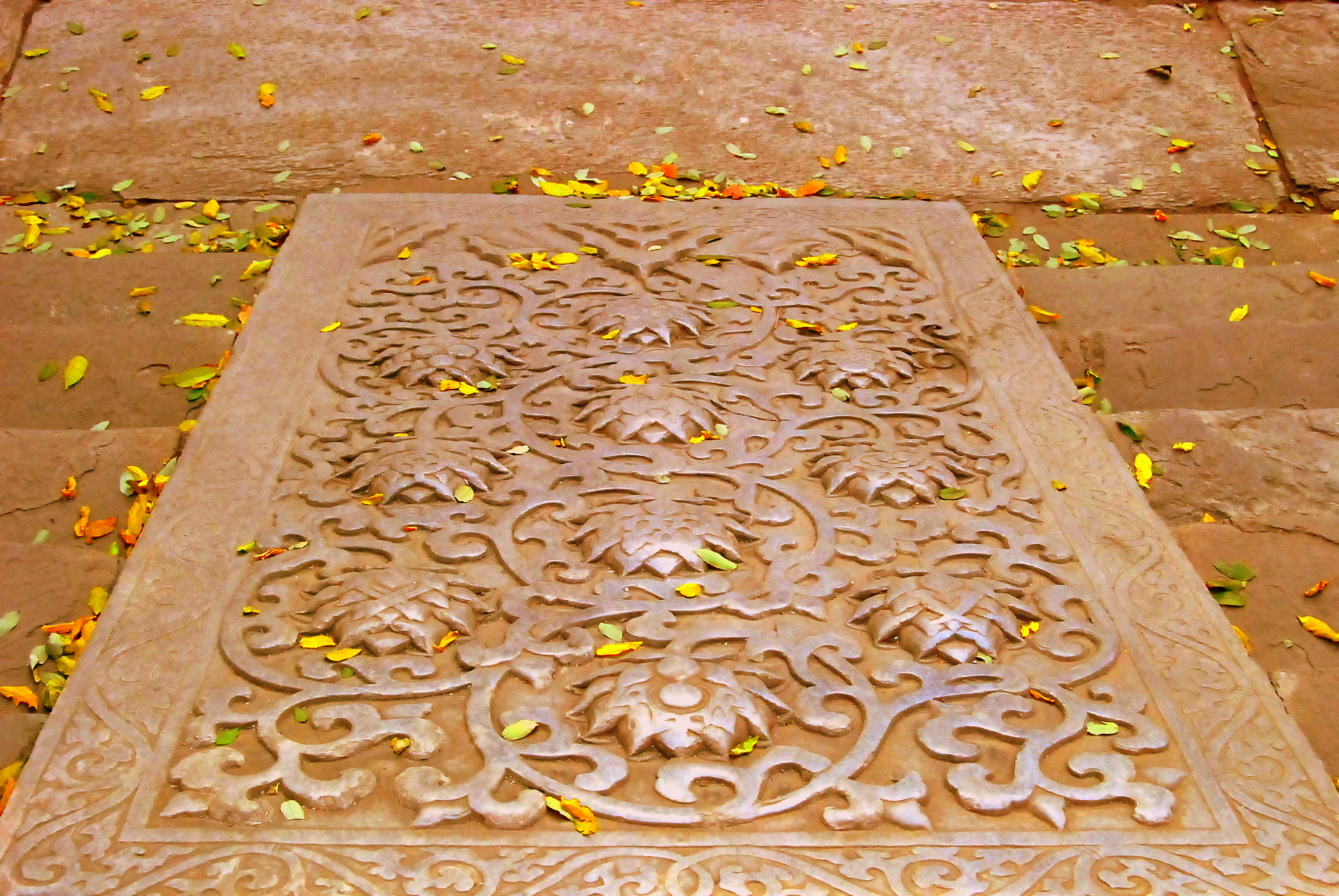 万寿寺台阶